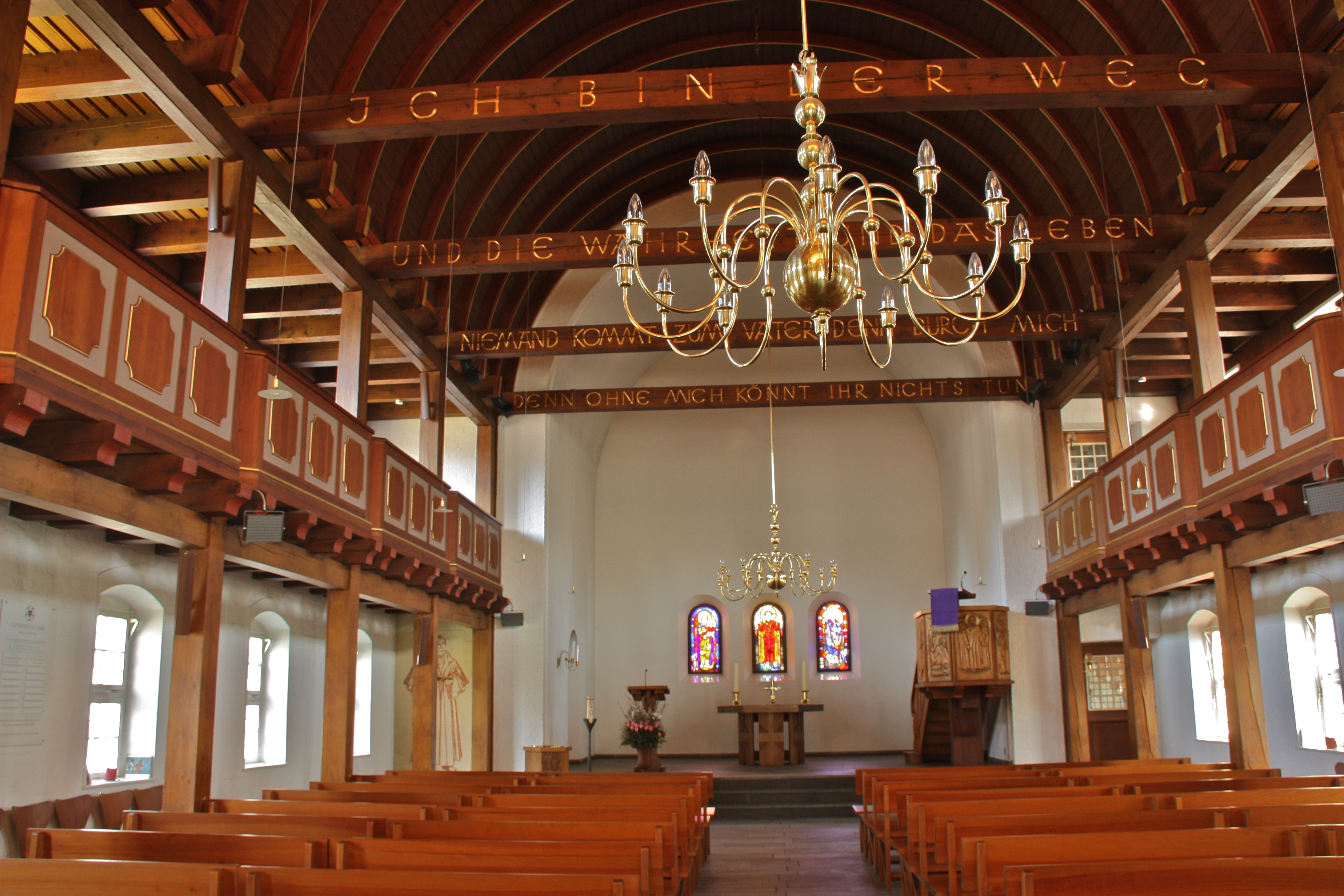 Hamburg, Wellingsbüttel, Lutherkirche, Innenraum